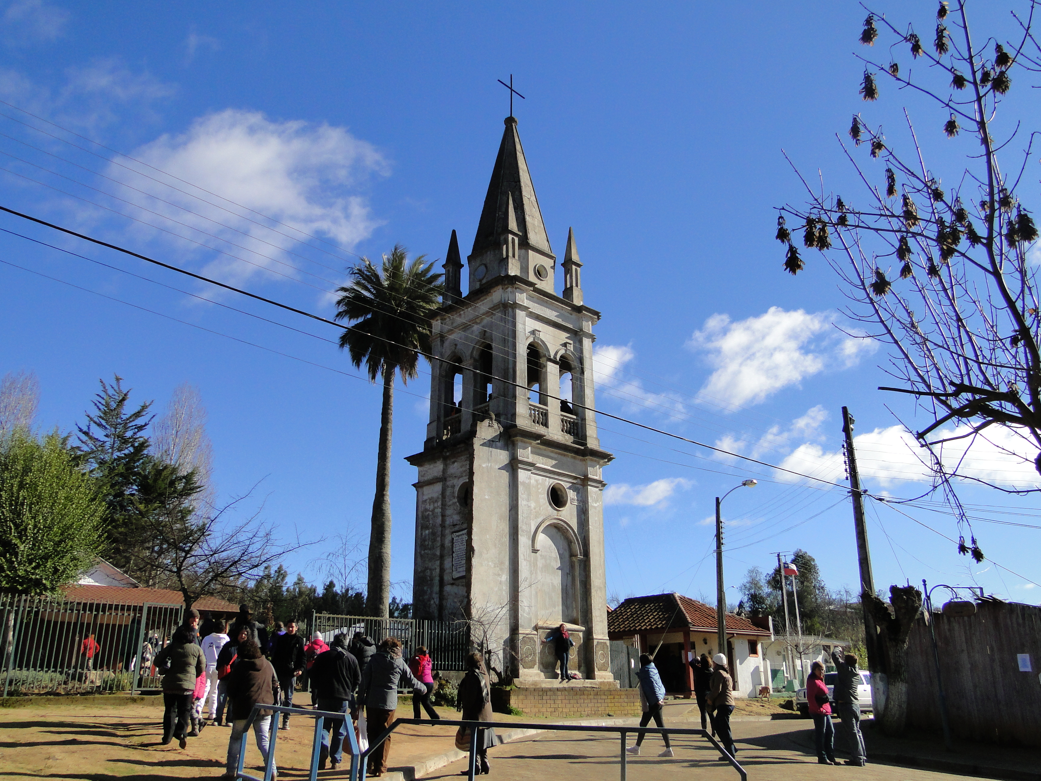 Conjunto jesuita de Rere. Vista frontal de la torre campanario y de la palma chilena que le acompaña. This is a photo of a national monument in Chile: 2209